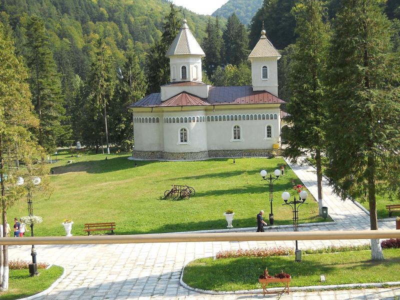 esglesia ortodoxa de Slănic Moldova